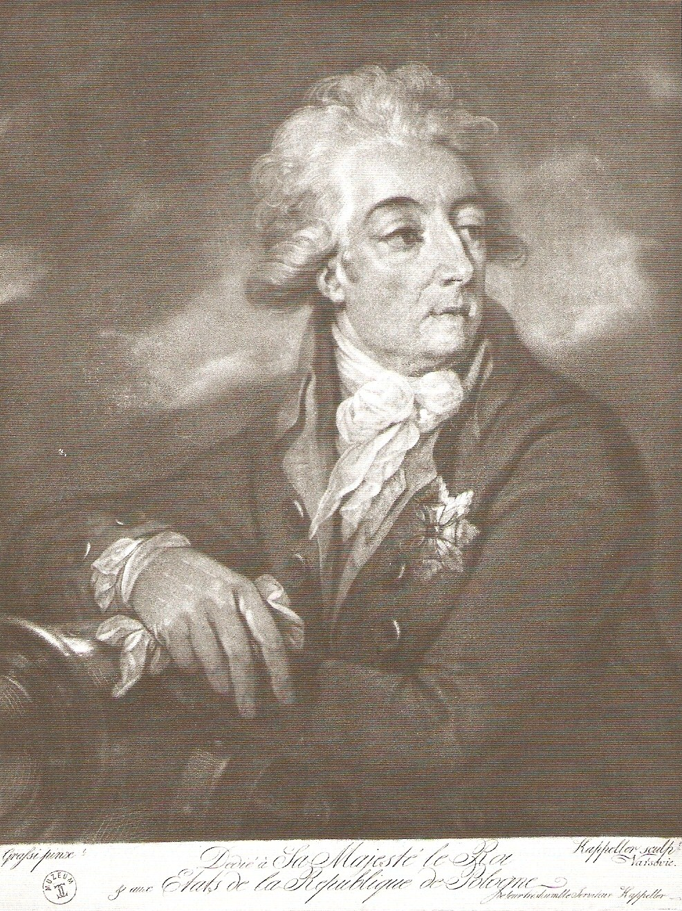 Adam Kazimierz Czartoryski, wg portretu Józefa Grassiego